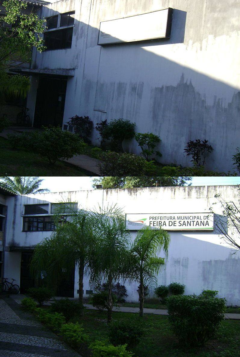 Reflexo que a luz causa impossibilitando de ler uma placa a depender do ângulo de visão. Imagem de edifício administrativo da prefeitura de Feira de Santana, na Bahia, Brasil.